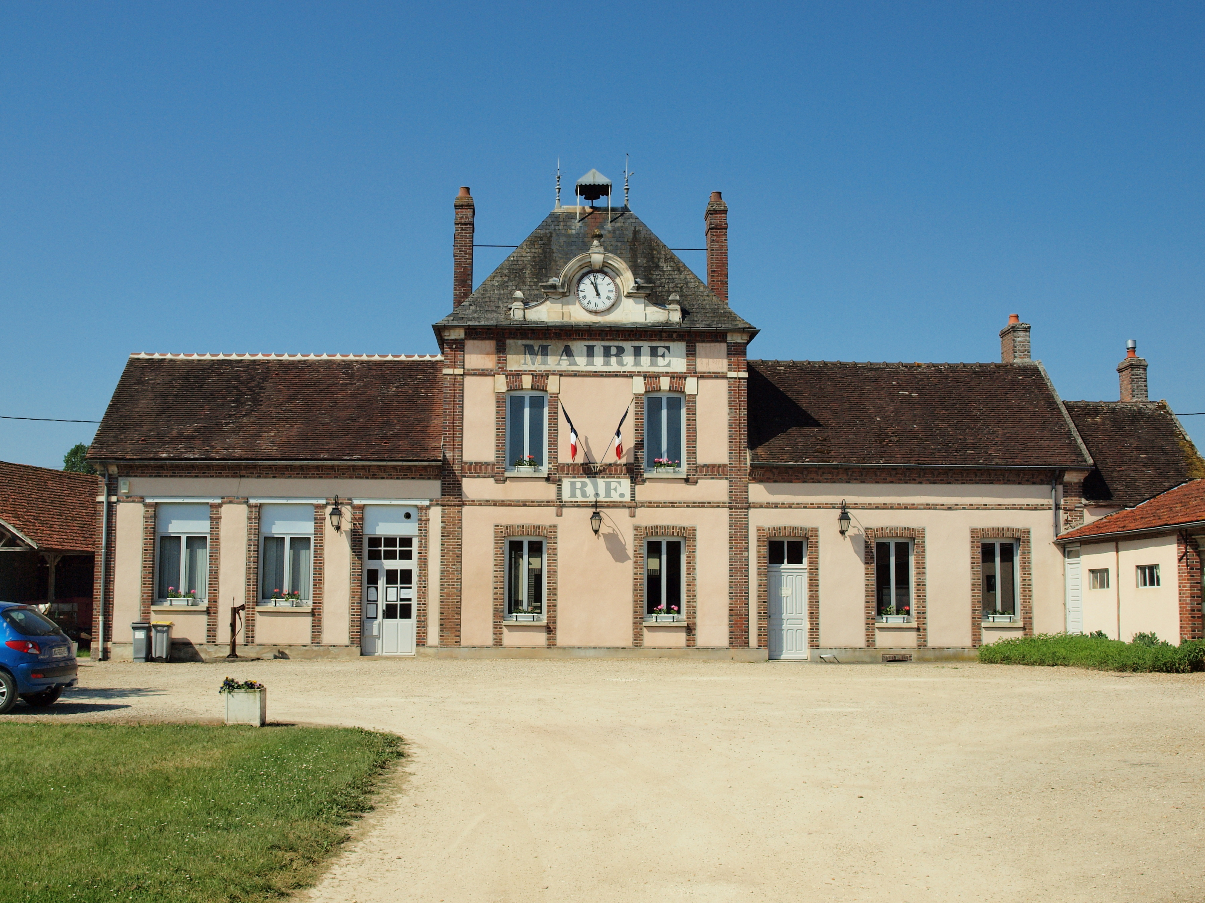 Mairie d'Évry (Yonne, France)